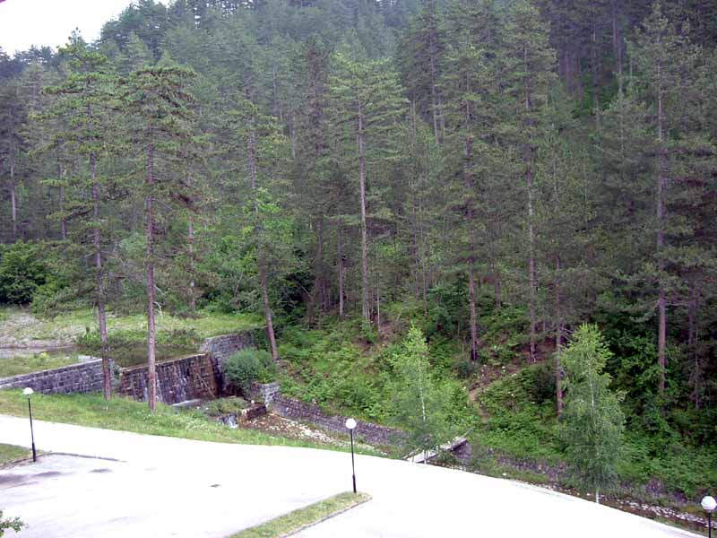 Visegradska banja near Visegrad Photo by: Aleksandar Bogicevic